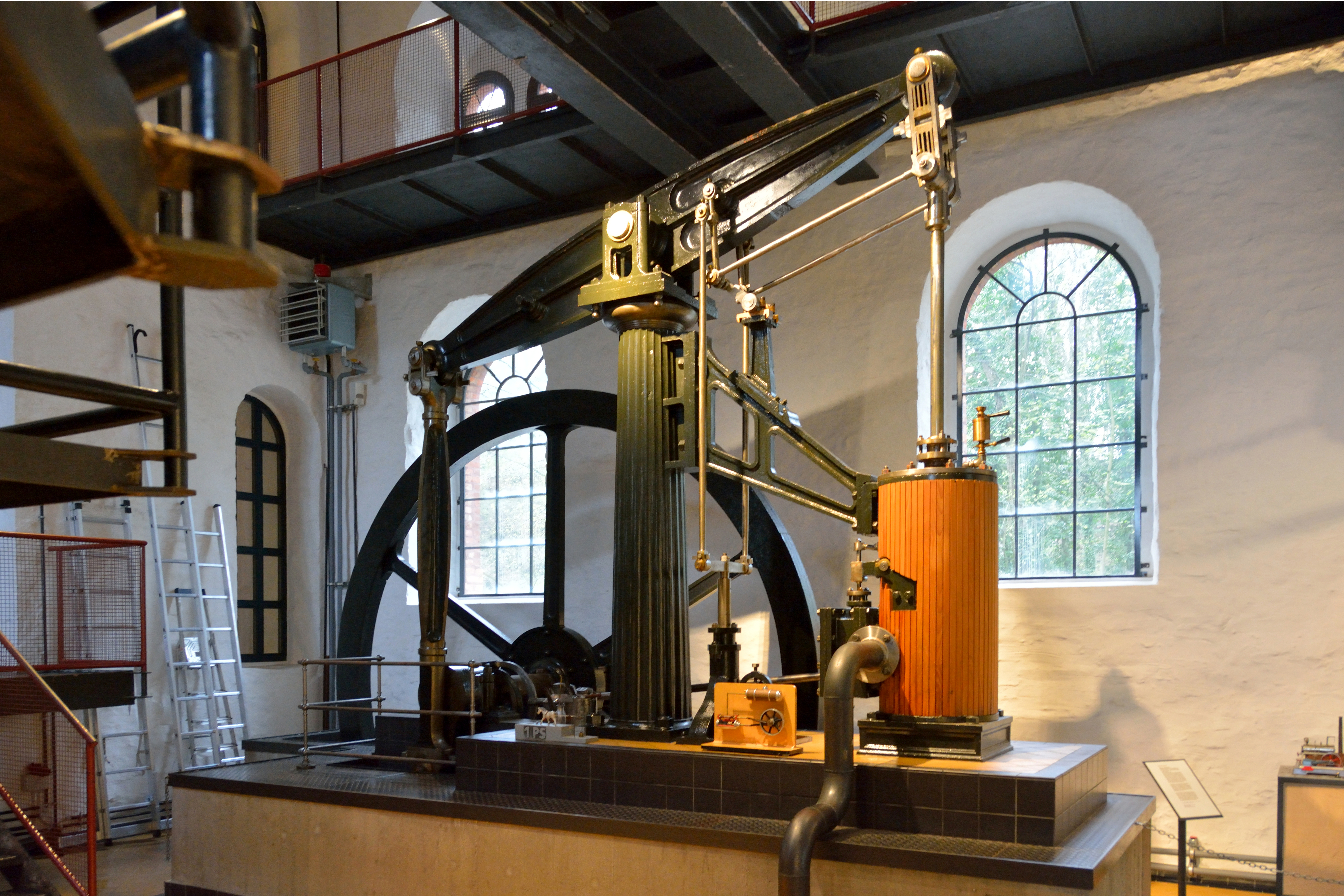 Impressionen aus dem "Museum Industriekultur" in Osnabrück.